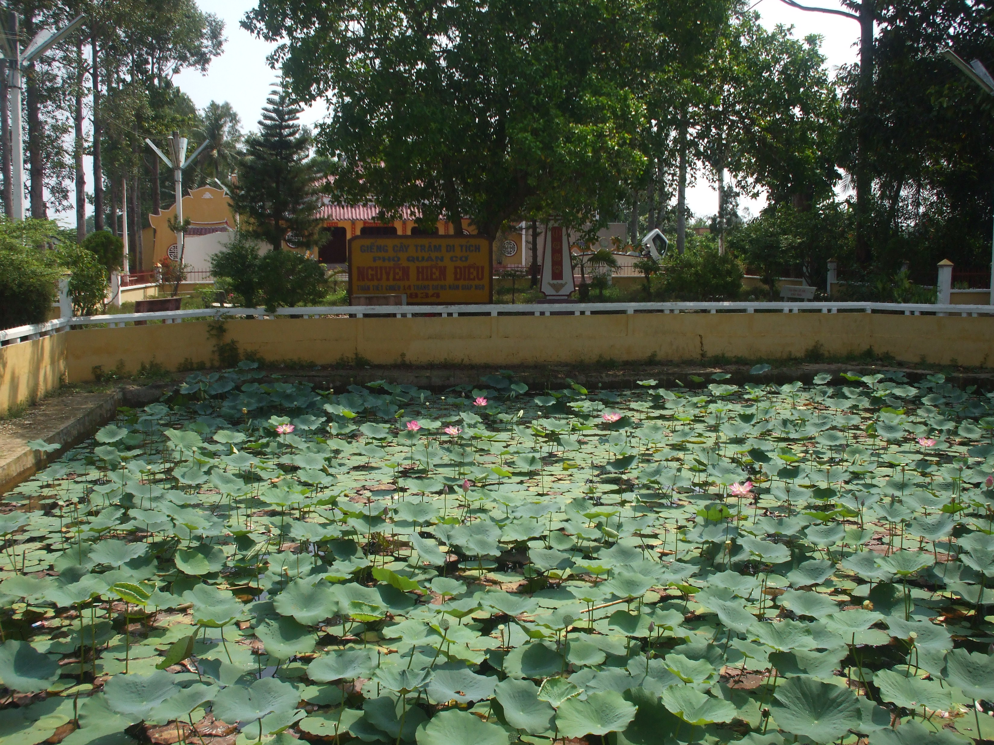 Giếng Cây Trâm (Rạch Giá, Kiên Giang), nơi Nguyễn Hiền Điều tuẫn tiết.